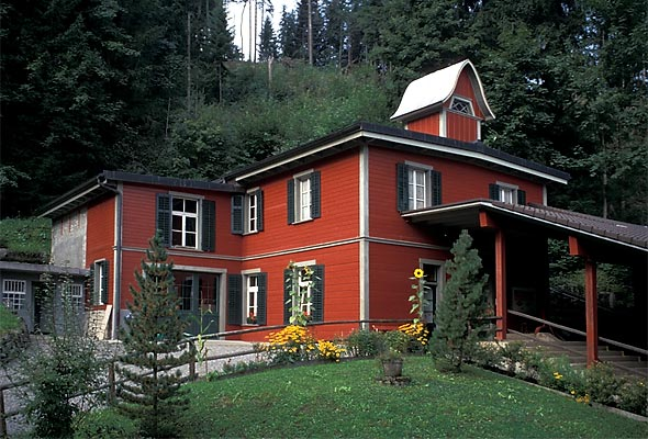 Kälti (Mittelstation der Stanserhornbahn), Schweiz